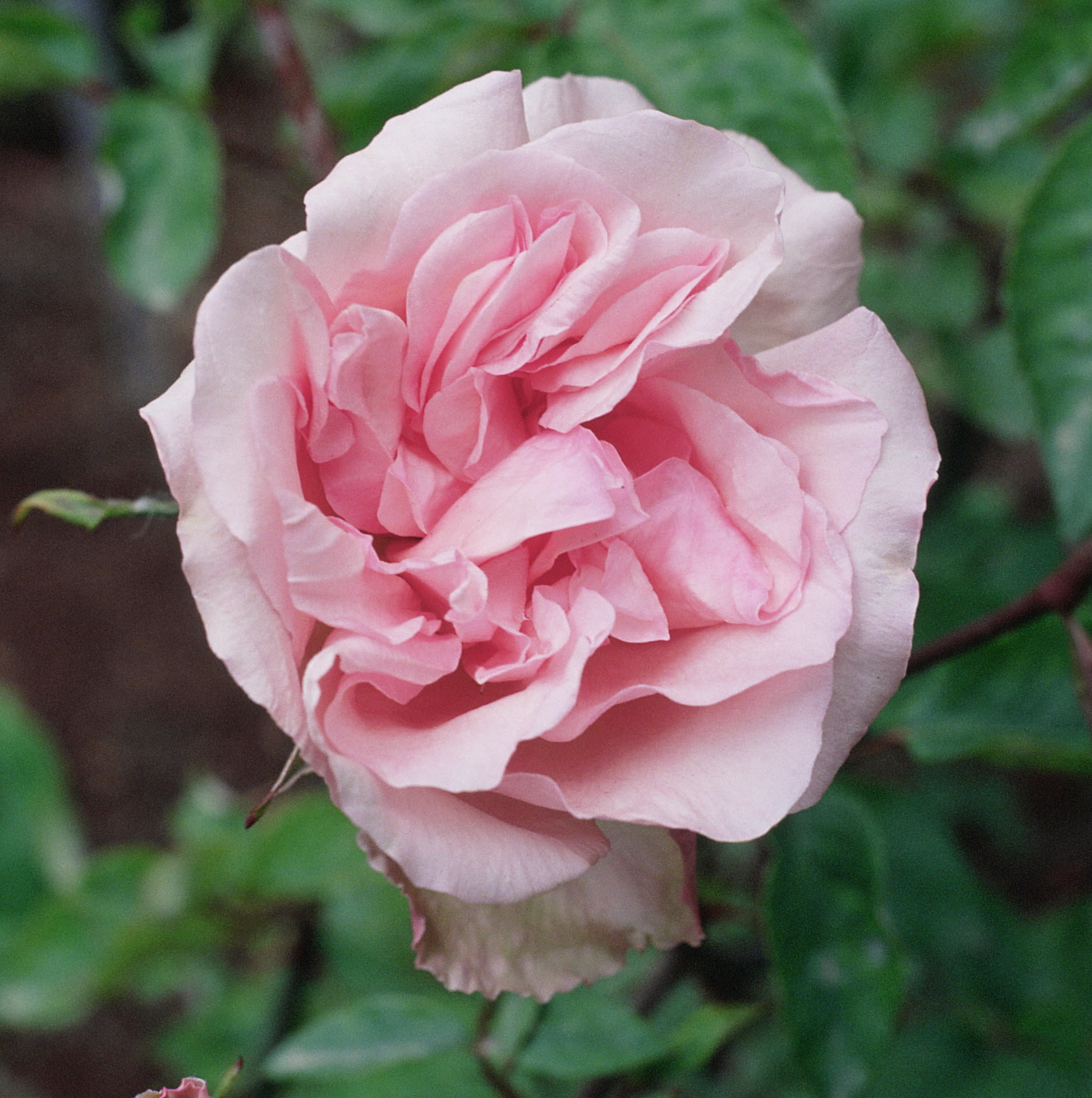 Rosa 'Mme Emilie Charrin', gr. Te, sect. Chinensis. Real Jardín Botánico, Madrid